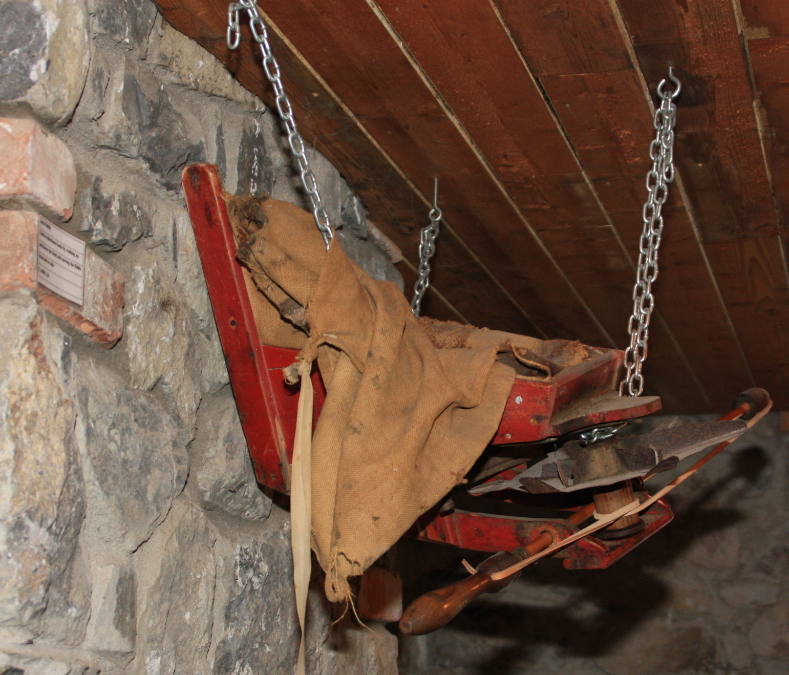 Altes landwirtschaftliches Gerät zur Ausbringung feiner Saaten oder Düngemittel, gefunden in den Skerries Mills, nähe Dublin (Republik Irland), vergleichbare Geräte noch handelsüblich unter dieser Bezeichnung